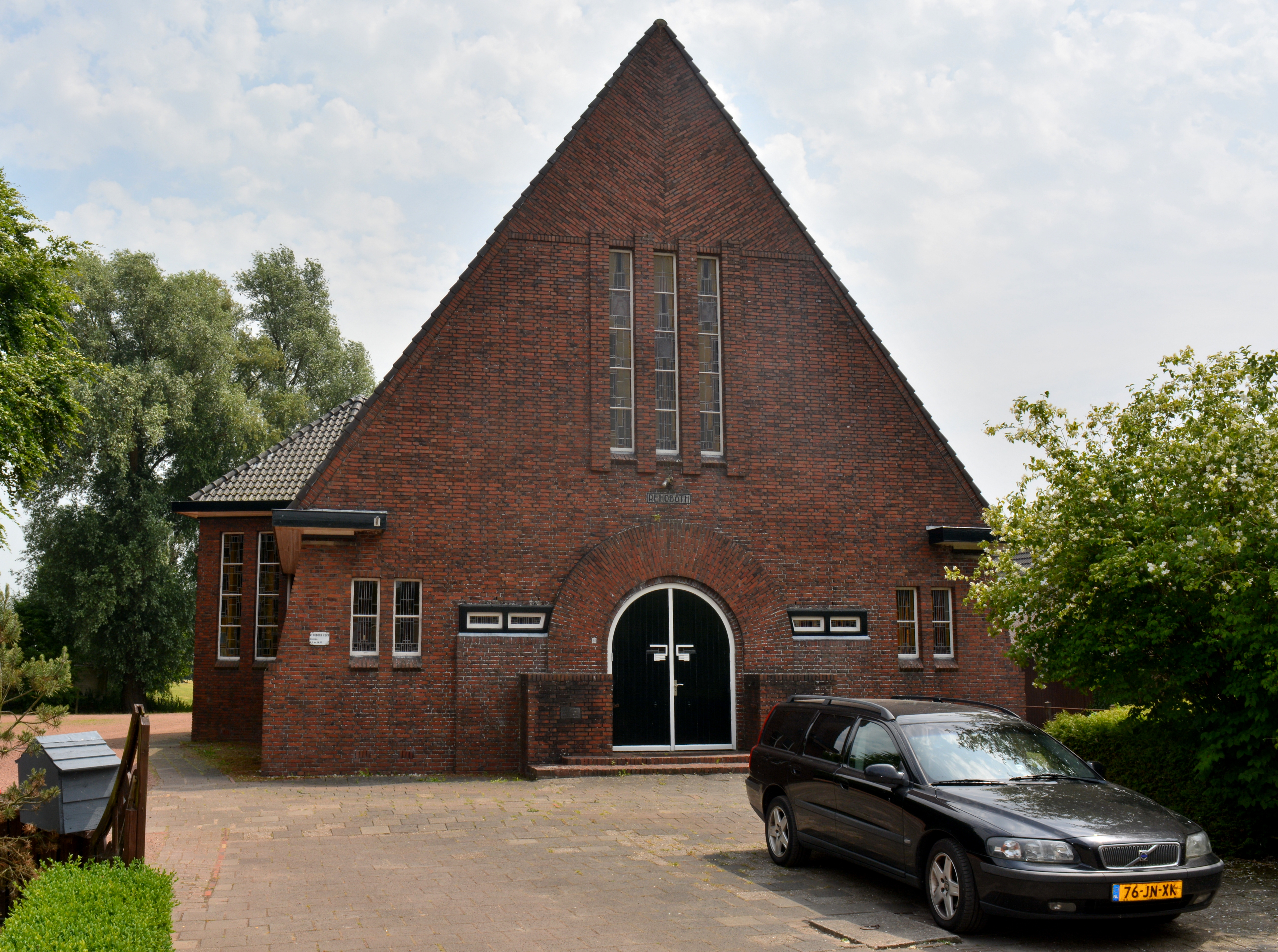 Twijzel, vrije geref. Rehobothkerk, voorgevel